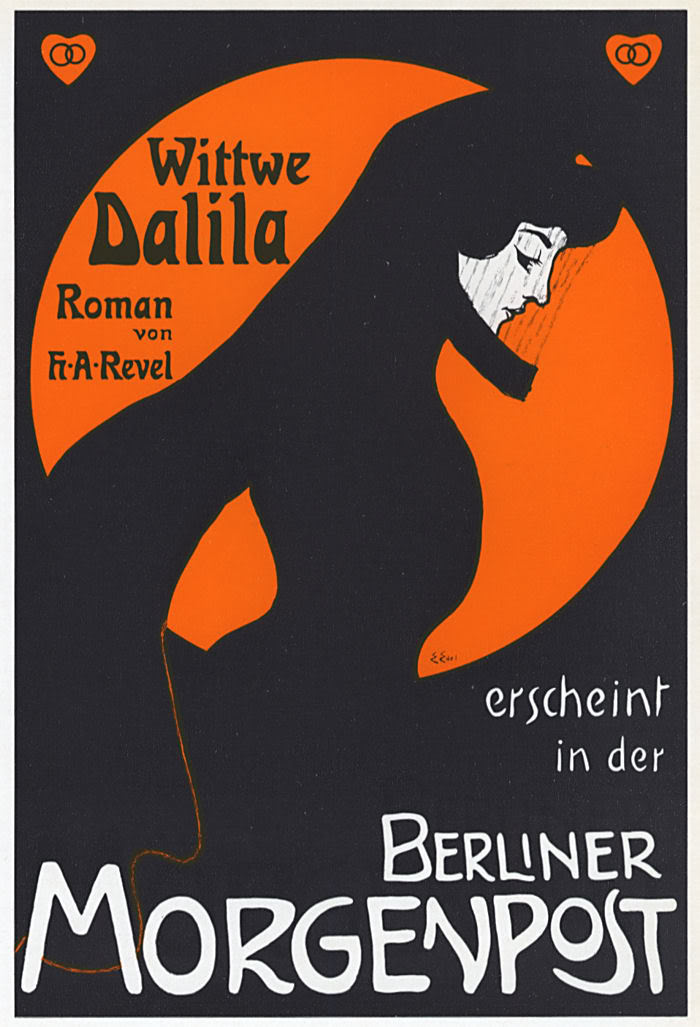 Werbeplakat für den Abdruck des Romans Wittwe Dalila von H. A. Revel in der Berliner Morgenpost, 1901